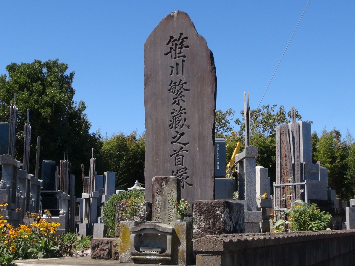 笹川繁蔵の首塚(千葉県旭市飯岡町・定慶寺)。2011年9月15日撮影。